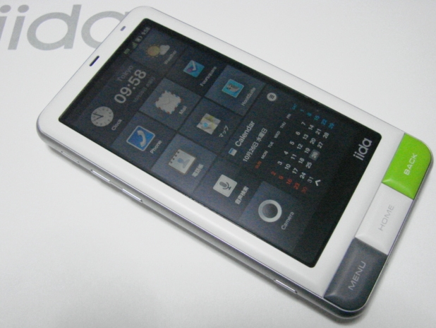 auのシャープ社製スマートフォンINFOBAR A01。 2011年度グッドデザイン賞受賞。